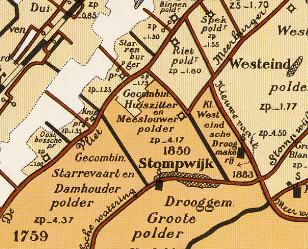 Gecombineerde Huiszitter-_en_Meeslouwerpolder